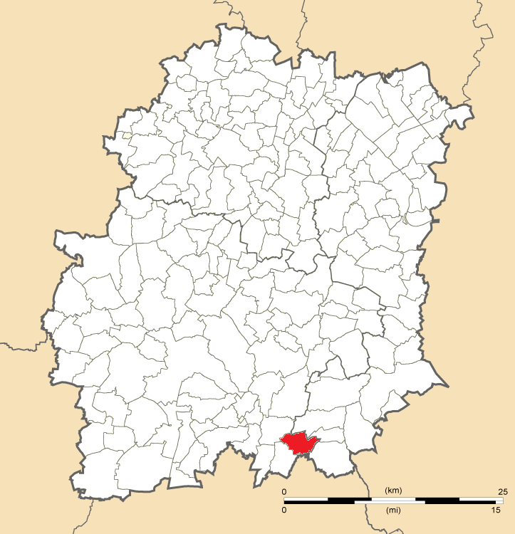 Carte de position de Champmotteux en Essonne (91)